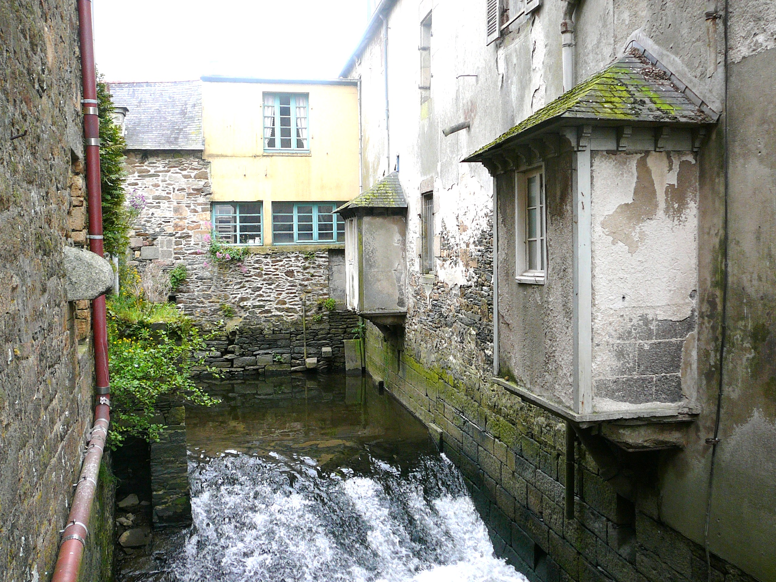 Landerneau : les eaux de l'Elorn coulant sous le pont Rohan